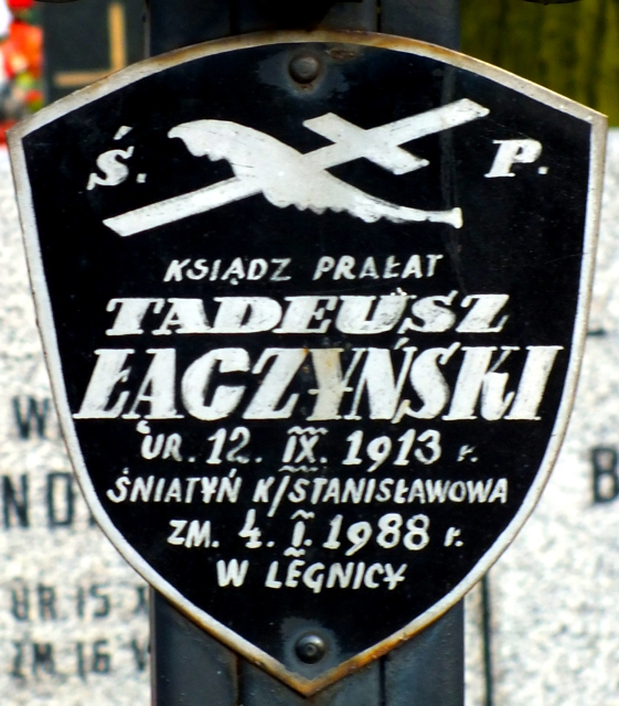 Legnica, cmentarz komunalny, tabliczka nagrobna na krzyżu